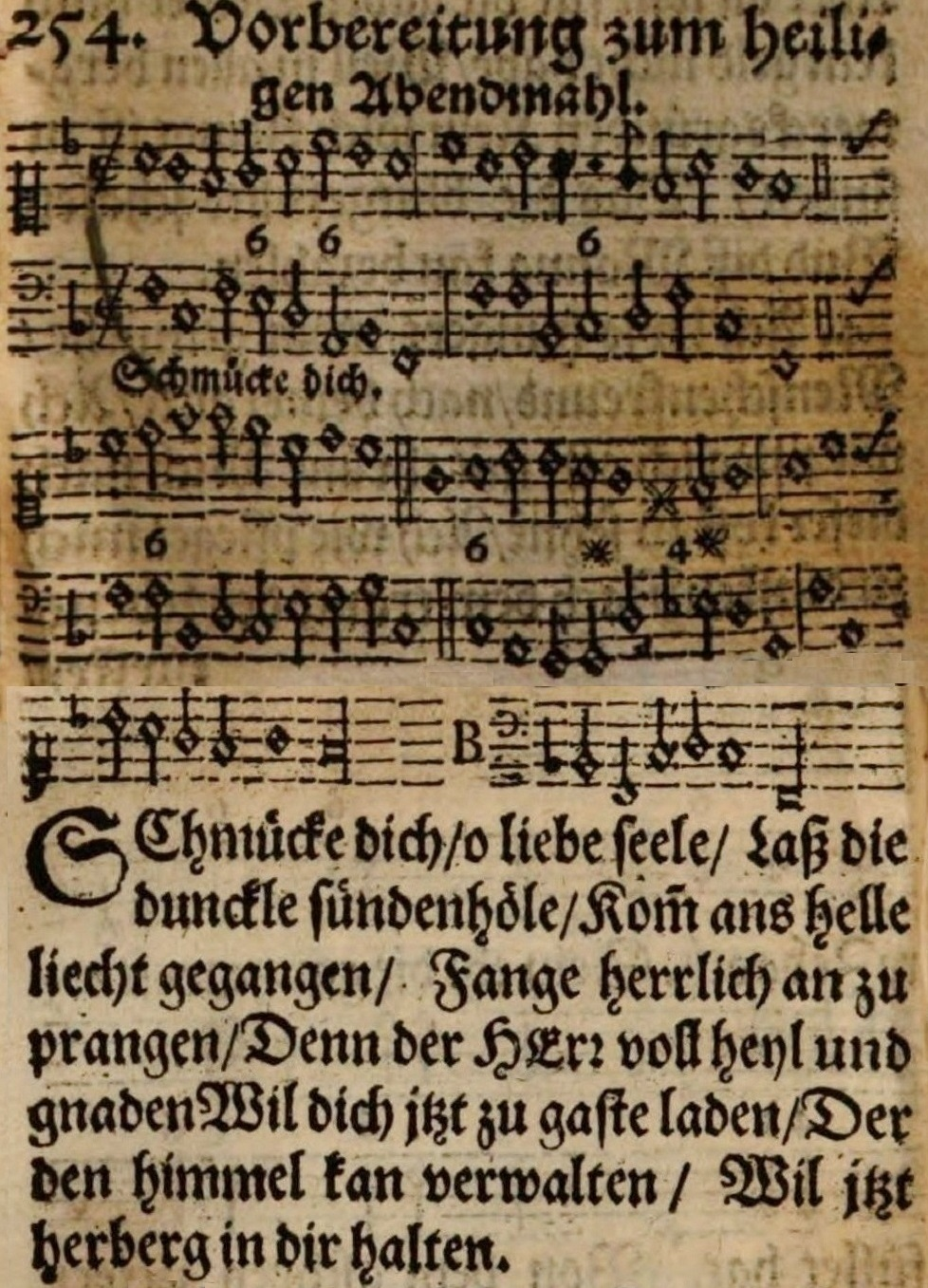 Schücke dich, o liebe Seele, Praxis Pietatis Melica 1653